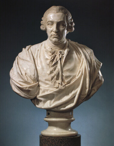 Busto di Agostino Paradisi, bronzo, Collezione privata